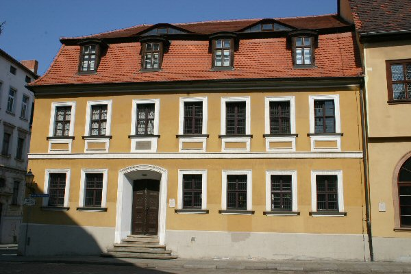 Halle (Saale), Händelhaus, eigenes Foto von 2005, public domain, Mewes